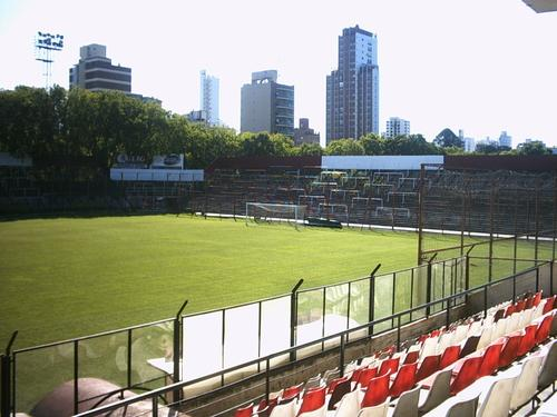 Vista, desde la platea oficial, del antiguo estadio del Club Estudiantes de La Plata; fue demolido en 2007 para construir la nueva cancha, a inaugurarse en 2019.